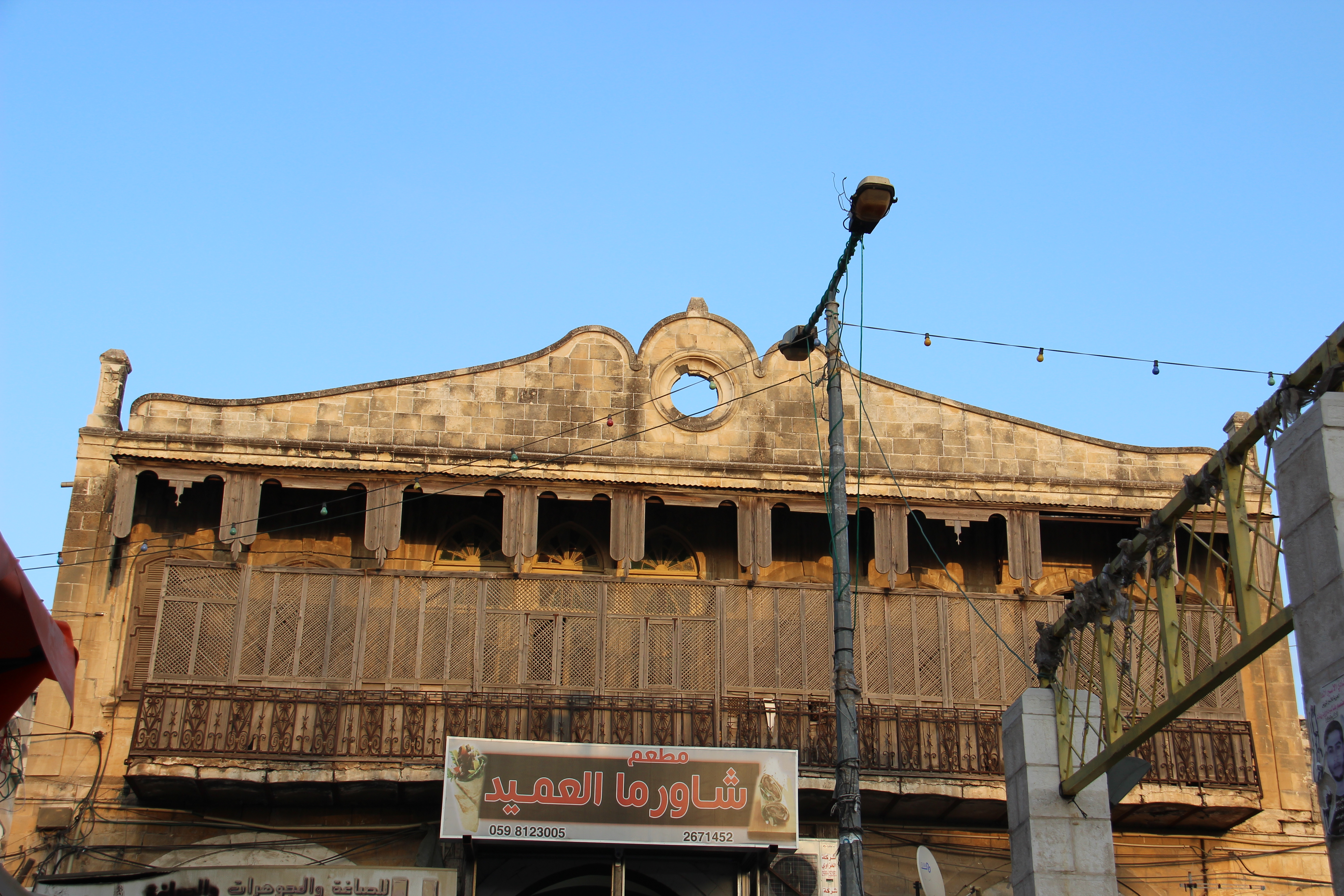 مبنى قديم في طولكرم